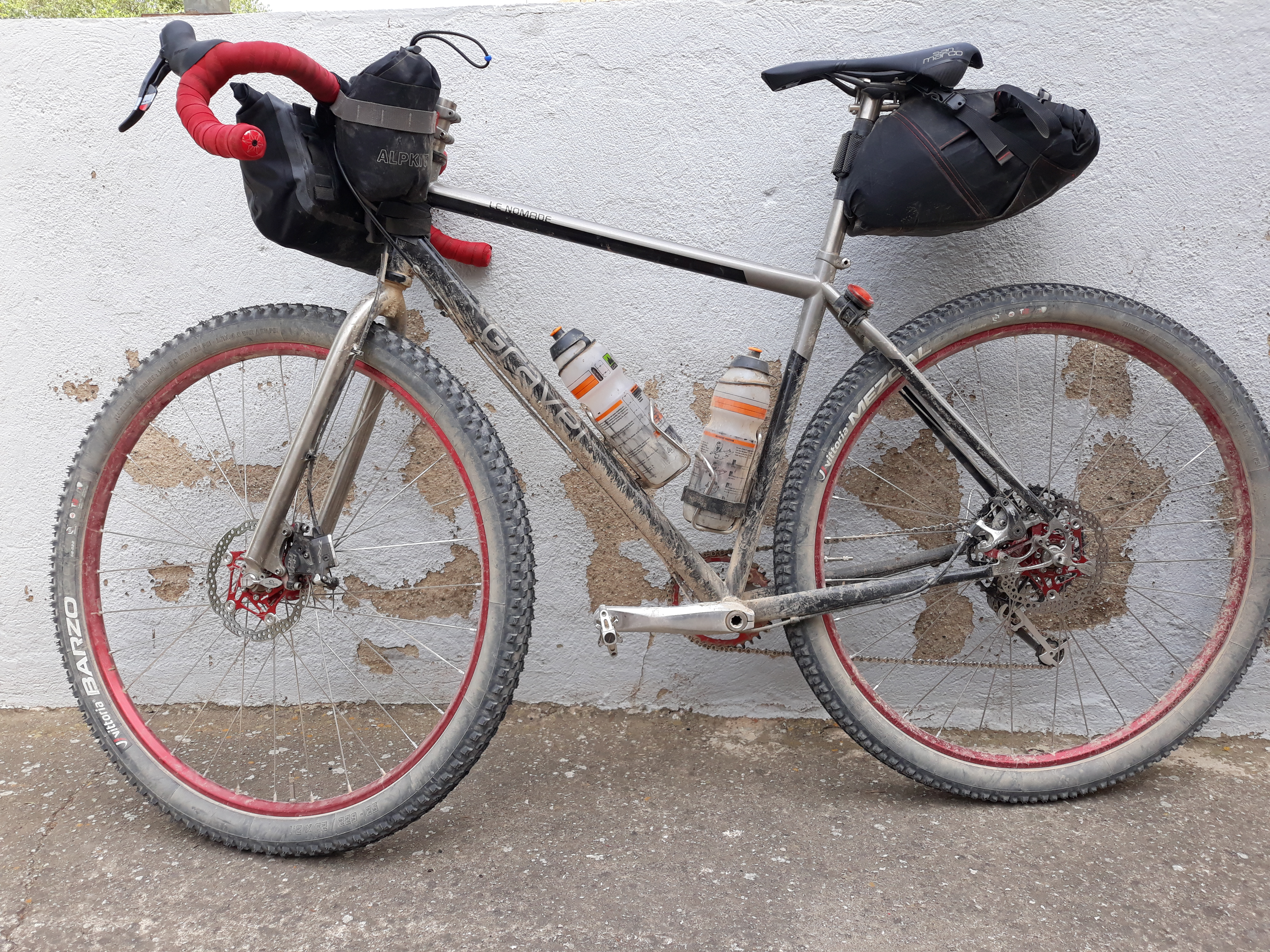 CAT700 2019